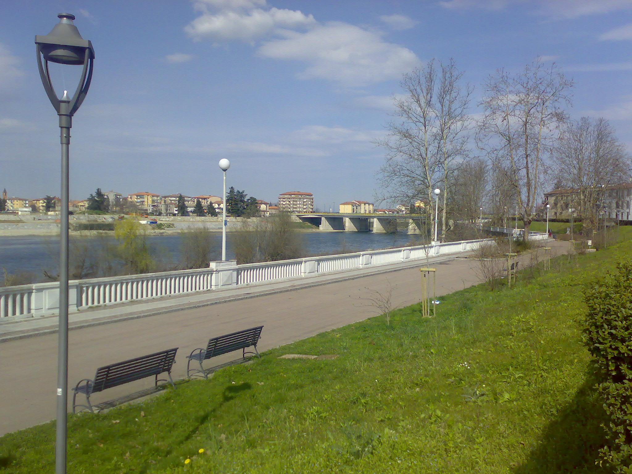 Vista del Po da Viale Lungo Po con il ponte di Via Adam, Casale Monferrato.